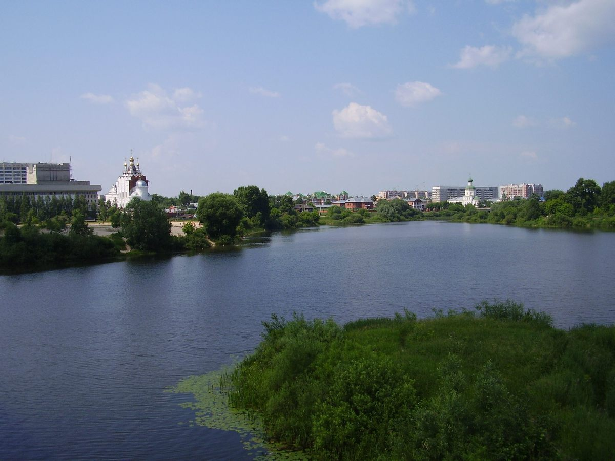 Йошкар-Ола. Пруд на Малой Кокшаге. Вид на исторический центр города.